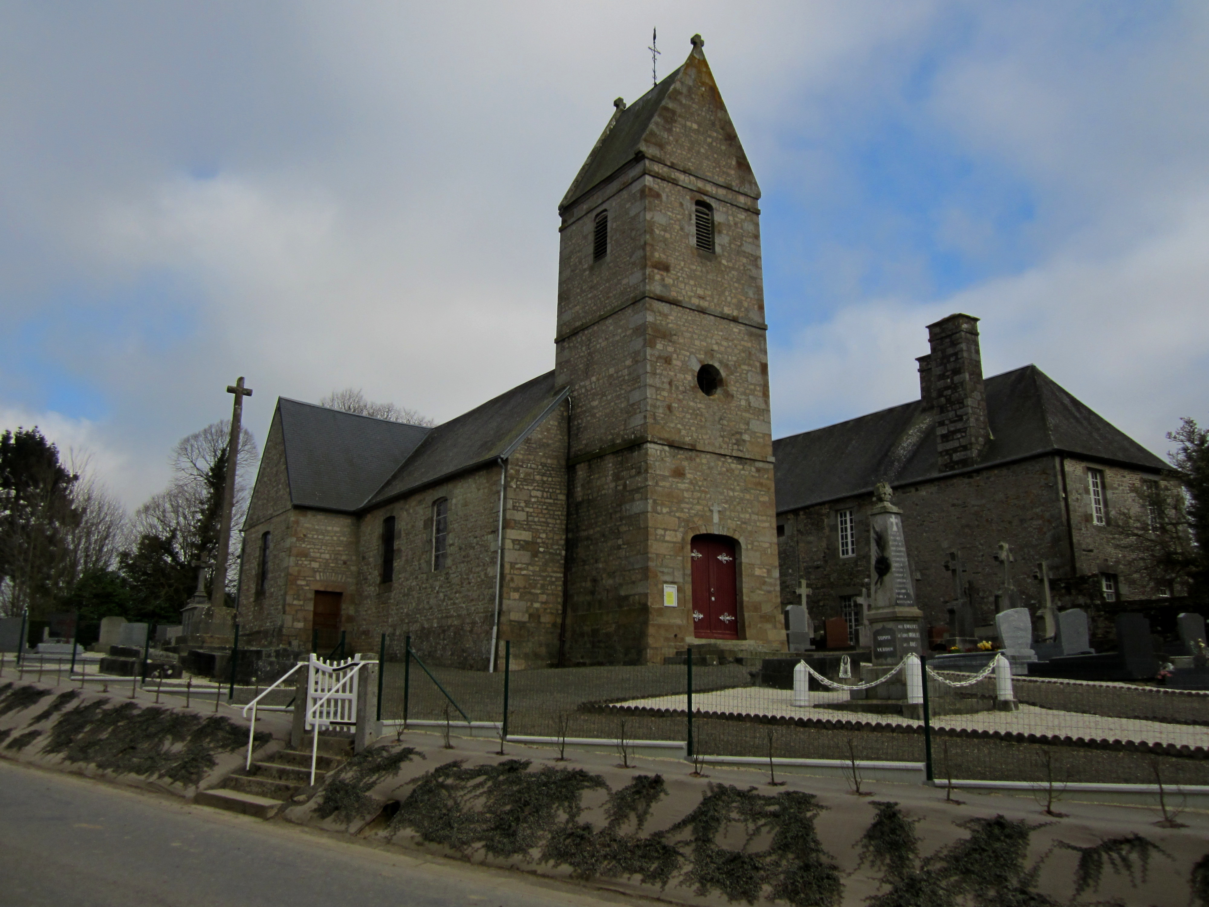 Saint-Nicolas-des-Bois, Manche